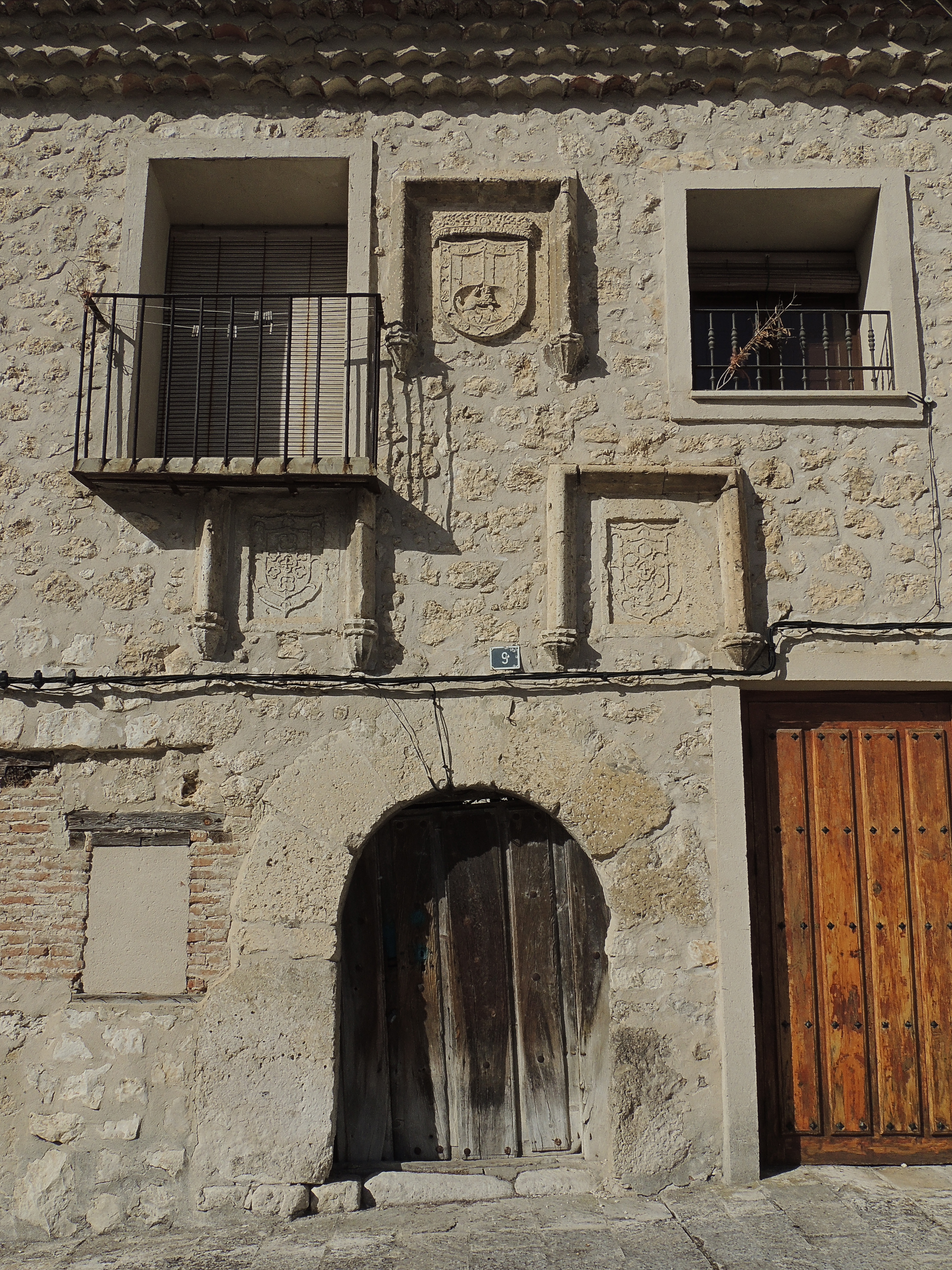 Fachada que da a la plaza del Estudio de Gramática en Cuéllar